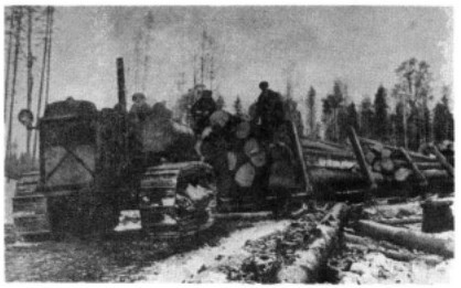 тракторы